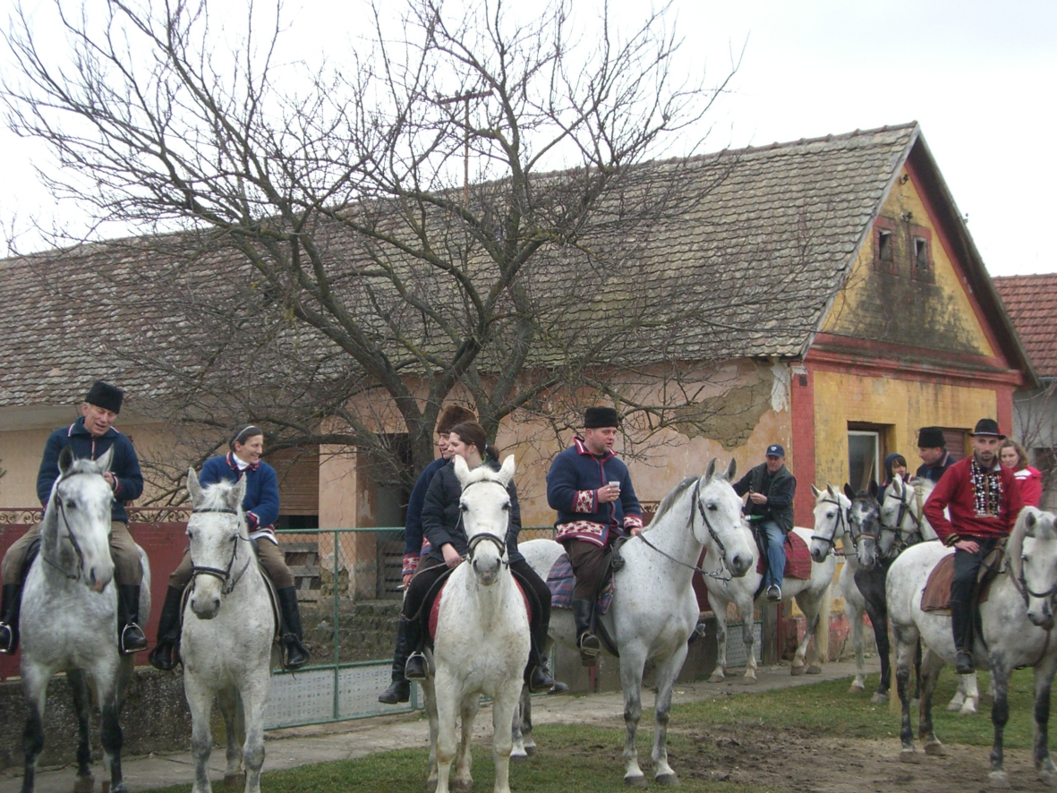 pokladno jahanje, Branjin Vrh